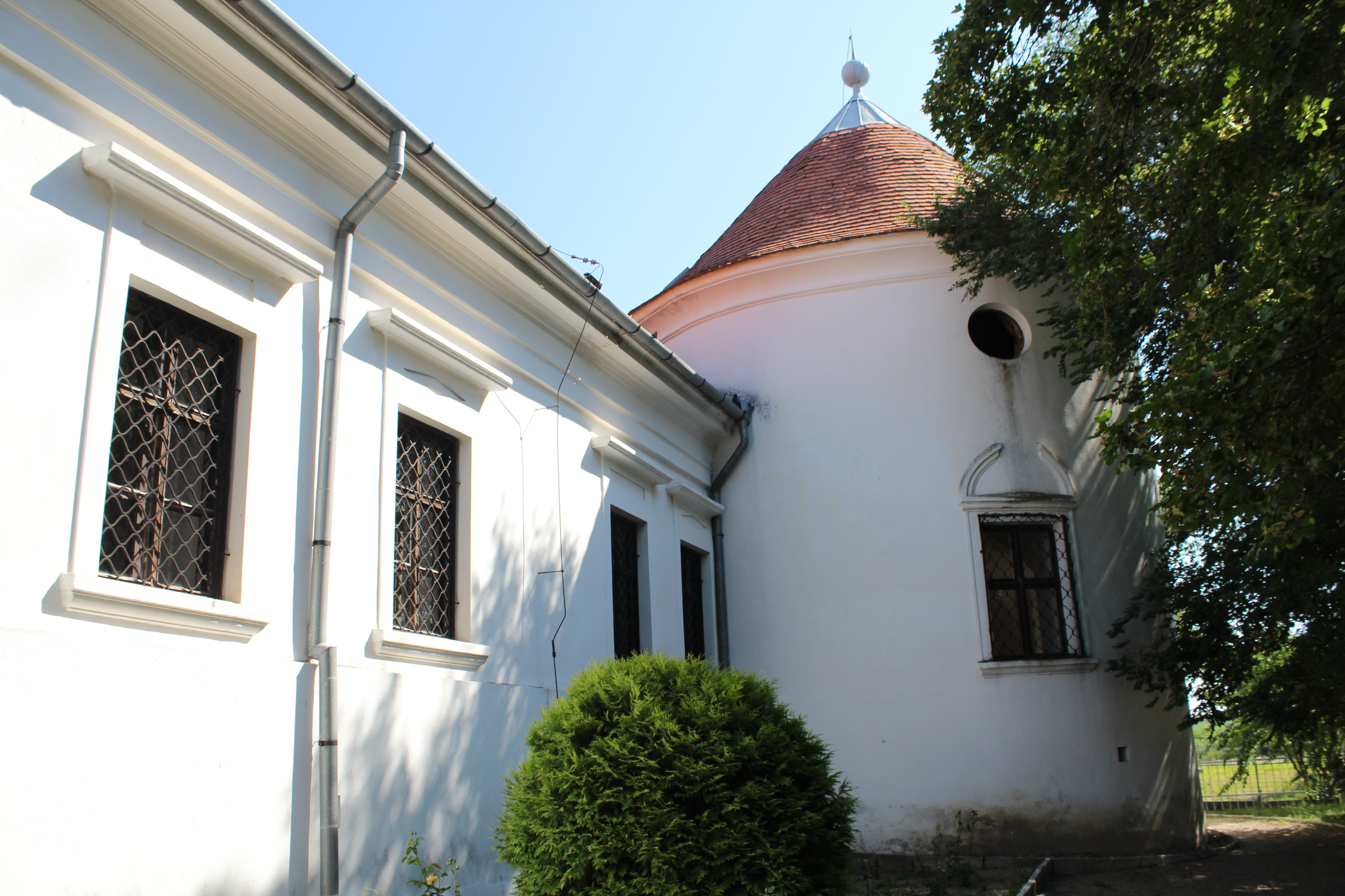 Bocskai-várkastély és magtár This is a photo of a monument in Hungary. Identifier: 5364